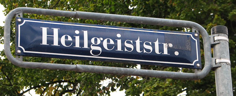 Dieses Bild zeigt ein Straßenschild Stralsunds.